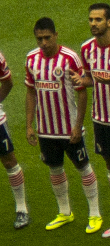 América vs Guadalajara